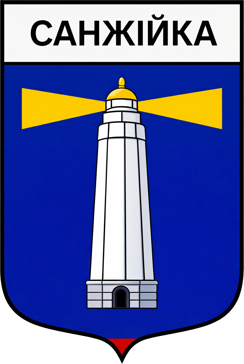 Герб села Санжійка